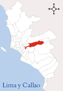 Localización del Distrito de Ate Esta imagen ha sido elaborada por --Edgardo Reyes 18:03 9 mar, 2005 (CET) Categoría:Mapas del Perú (imagen)